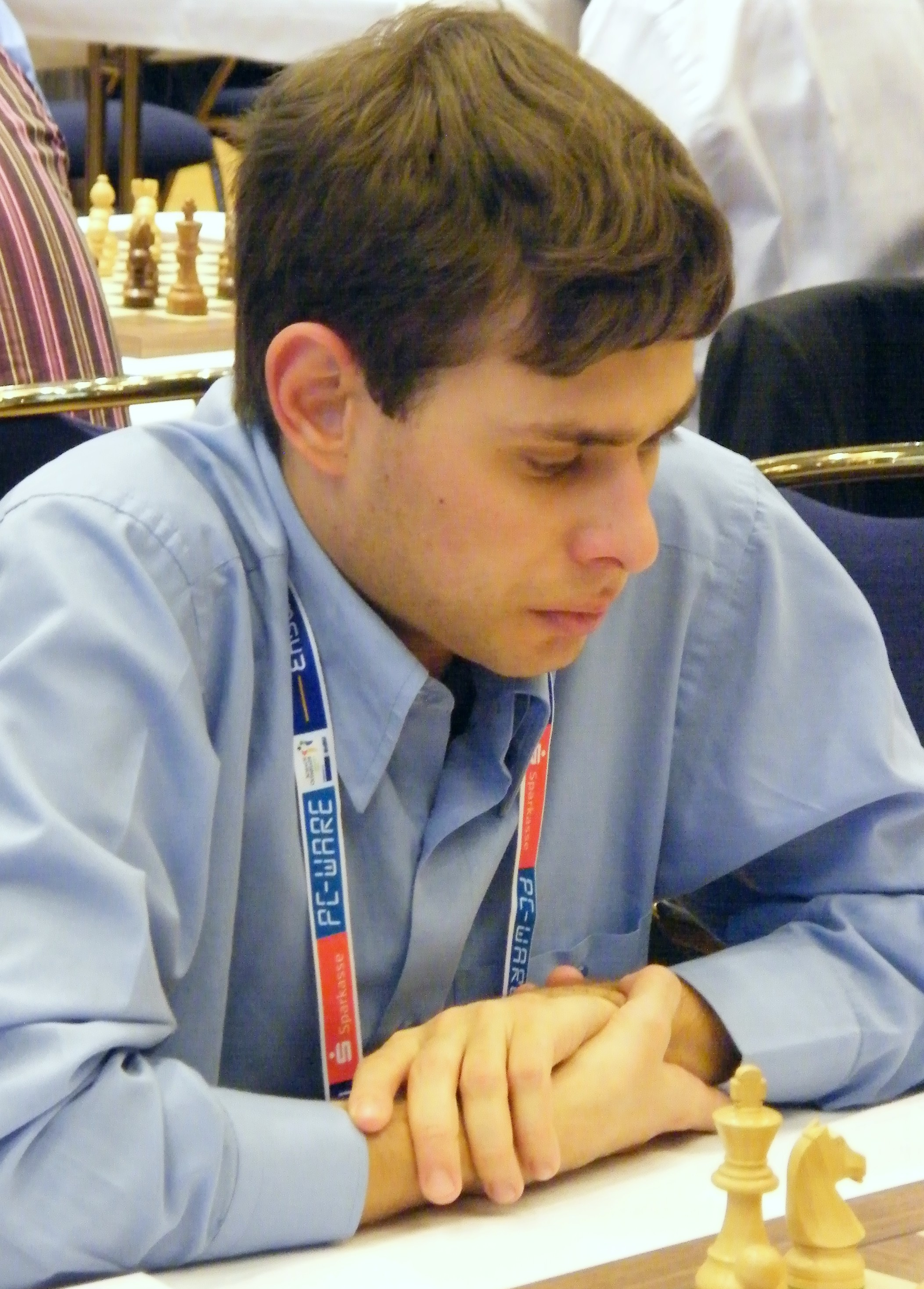 Jewgenij Postny bei der 38. Schacholympiade in Dresden 2008